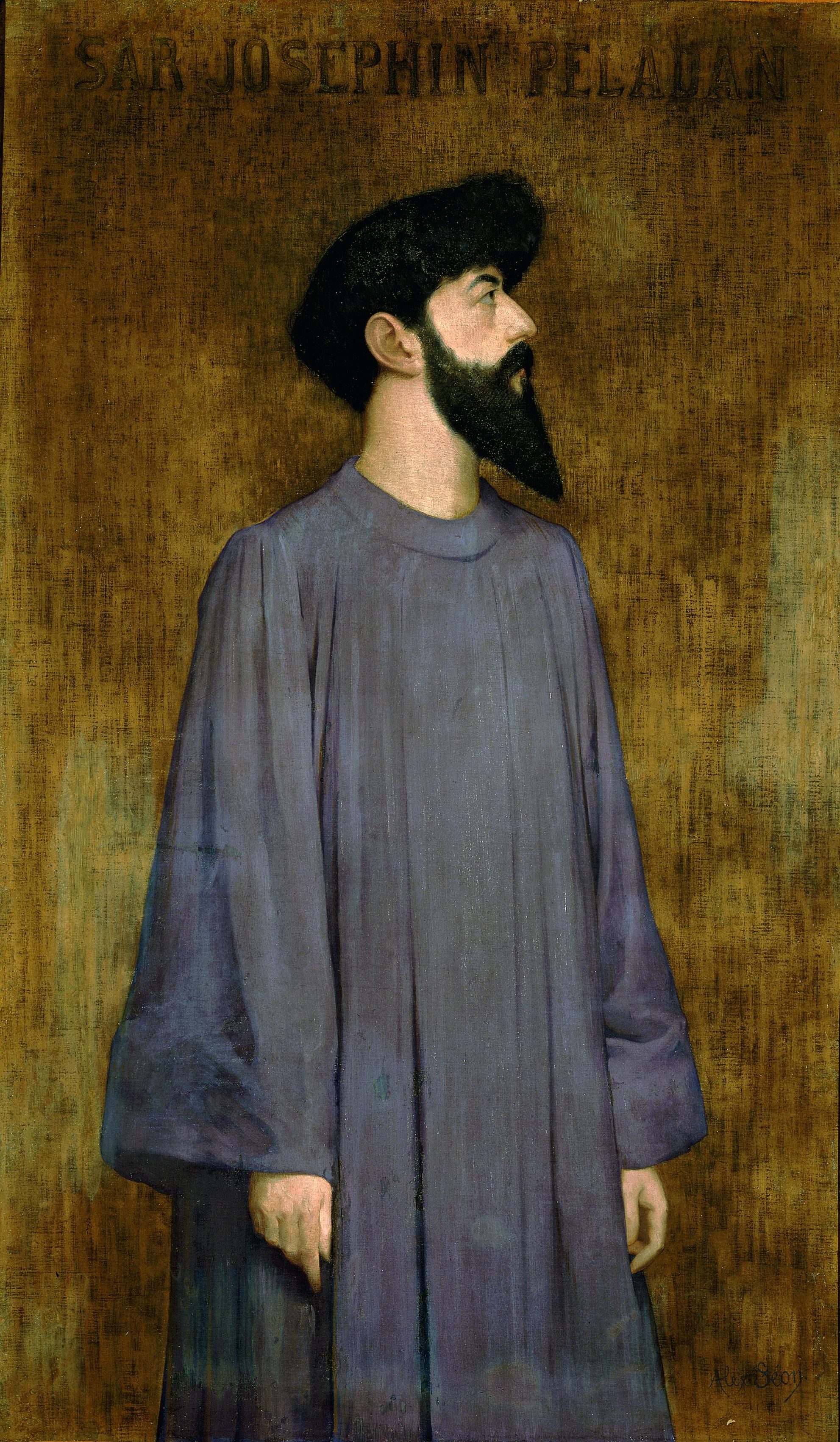 Alexandre Séon (1855-1917), Portrait du Sâr Joséphin Péladan, 1892, Musée des beaux-arts de Lyon